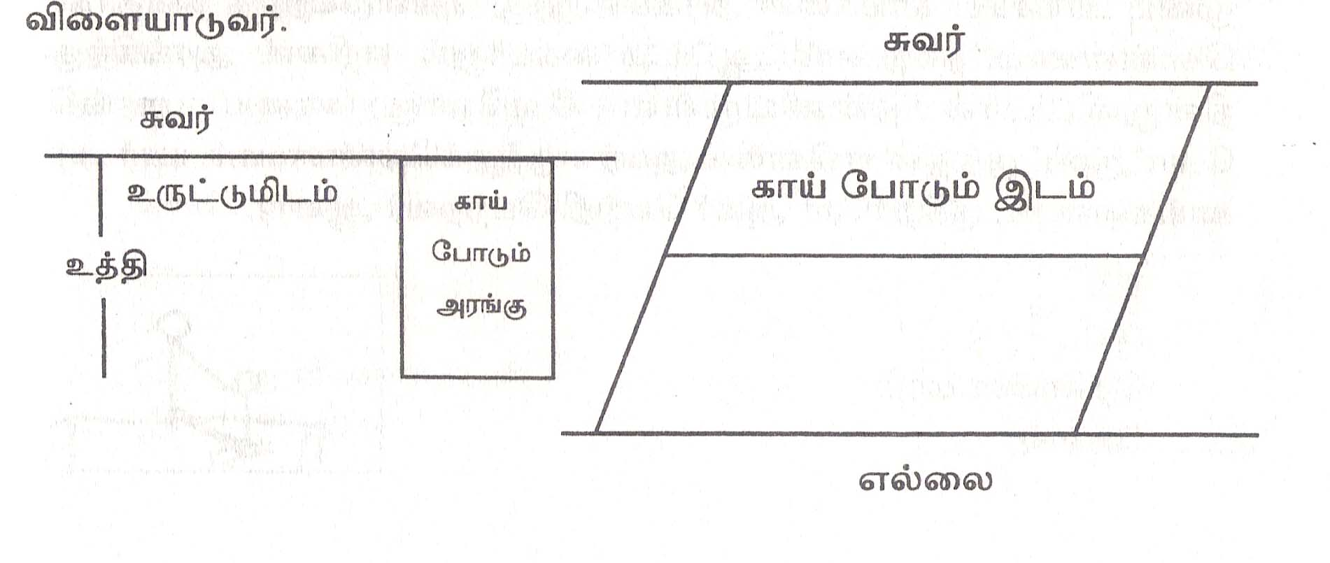 தெள்ளுருட்டான் விளையாட்டு அரங்கம். மறைகின்ற விளையாட்டுகள் என்னும் எனது நூலிலிருந்து எடுத்துப் பதிவேற்றப்பட்டது.